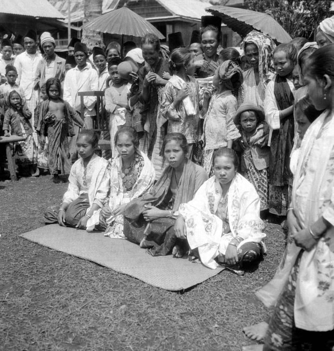 Negatief. Dansende gadis (maagden) te Kesambe bij Tjoeroep, Benkoelen